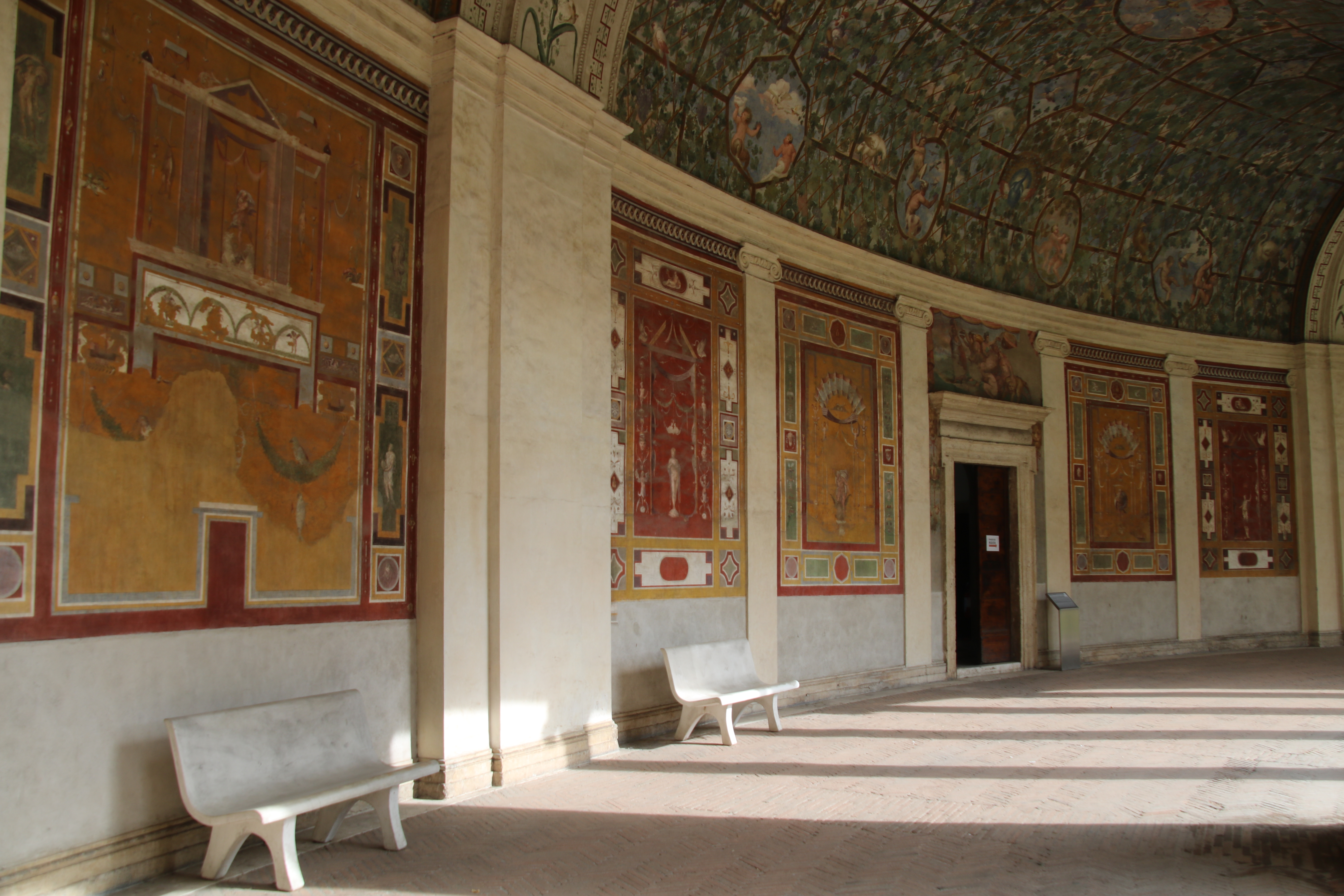 Villa giulia, portici con affreschi di pietro venale e altri This is a photo of a monument which is part of cultural heritage of Italy.